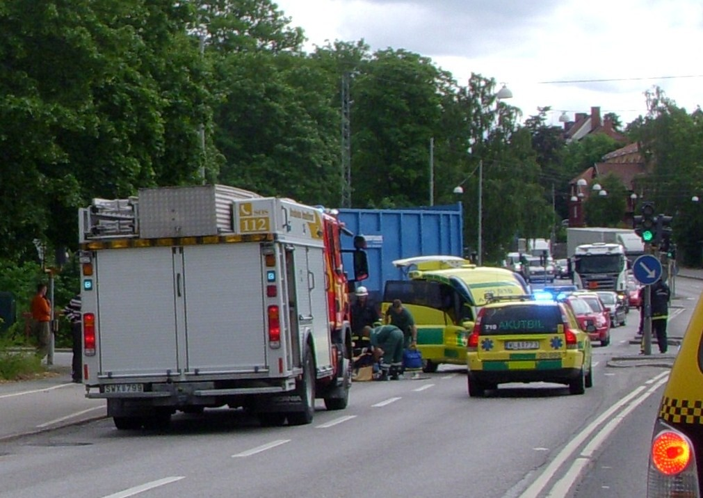 Utryckningsfordon vid en trafikolycka på Ulvsundavägen i Stockholm